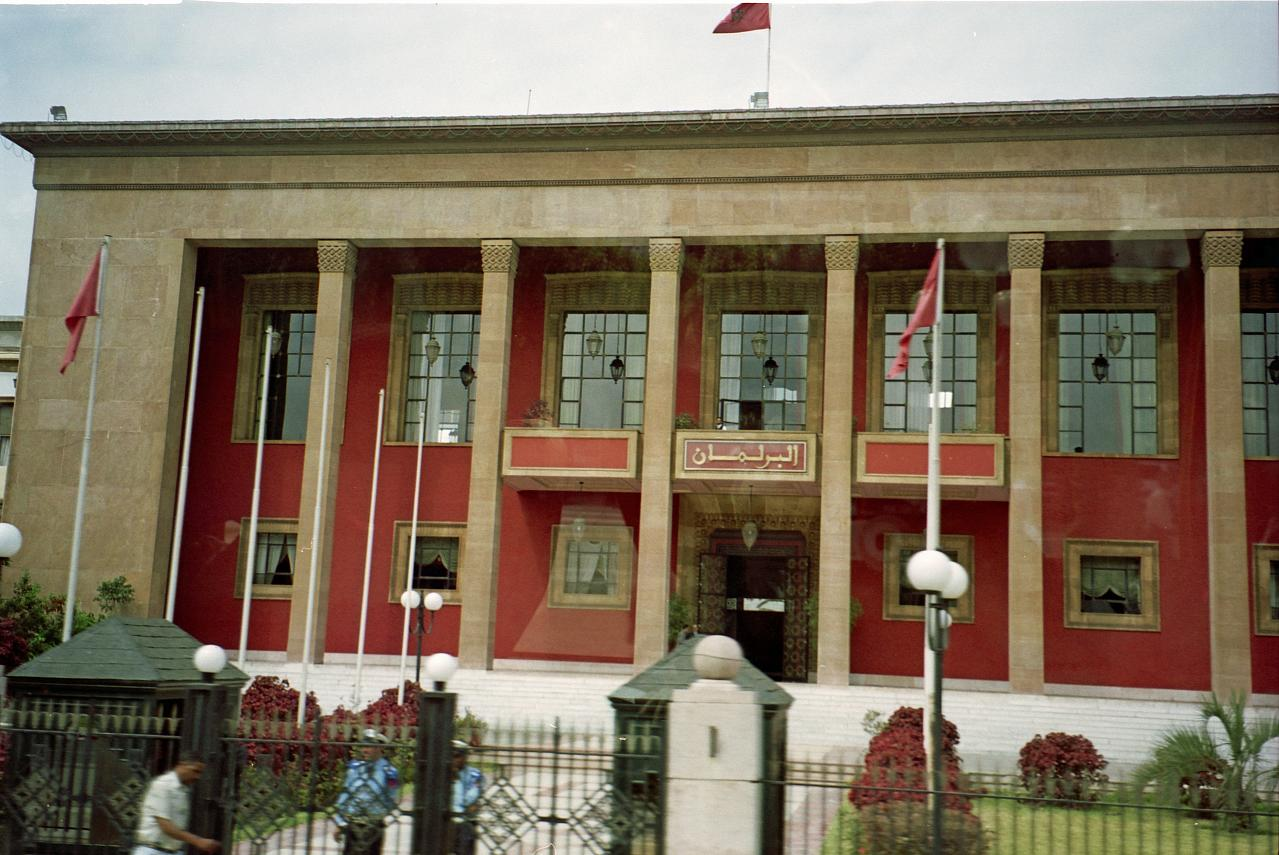 Morocco-24